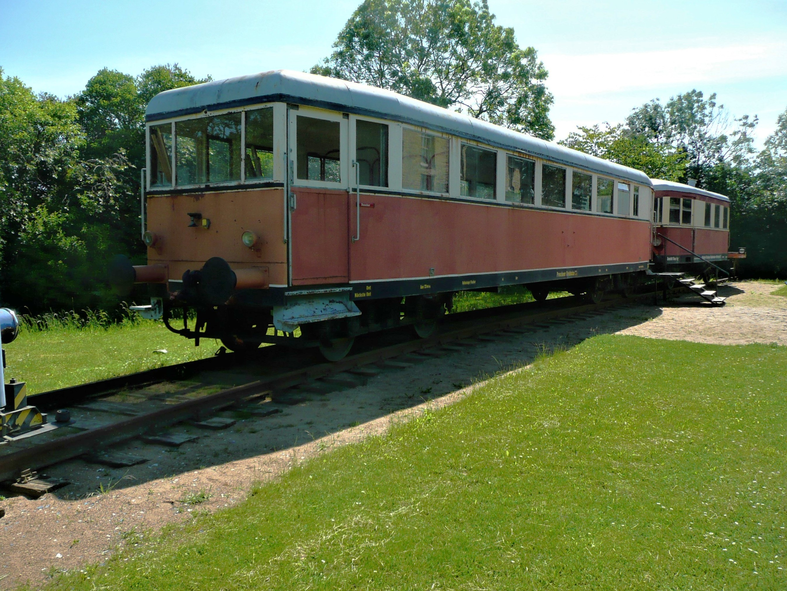 VT 137 527 der Bauart Mosel im Eisenbahnmuseum Gramzow